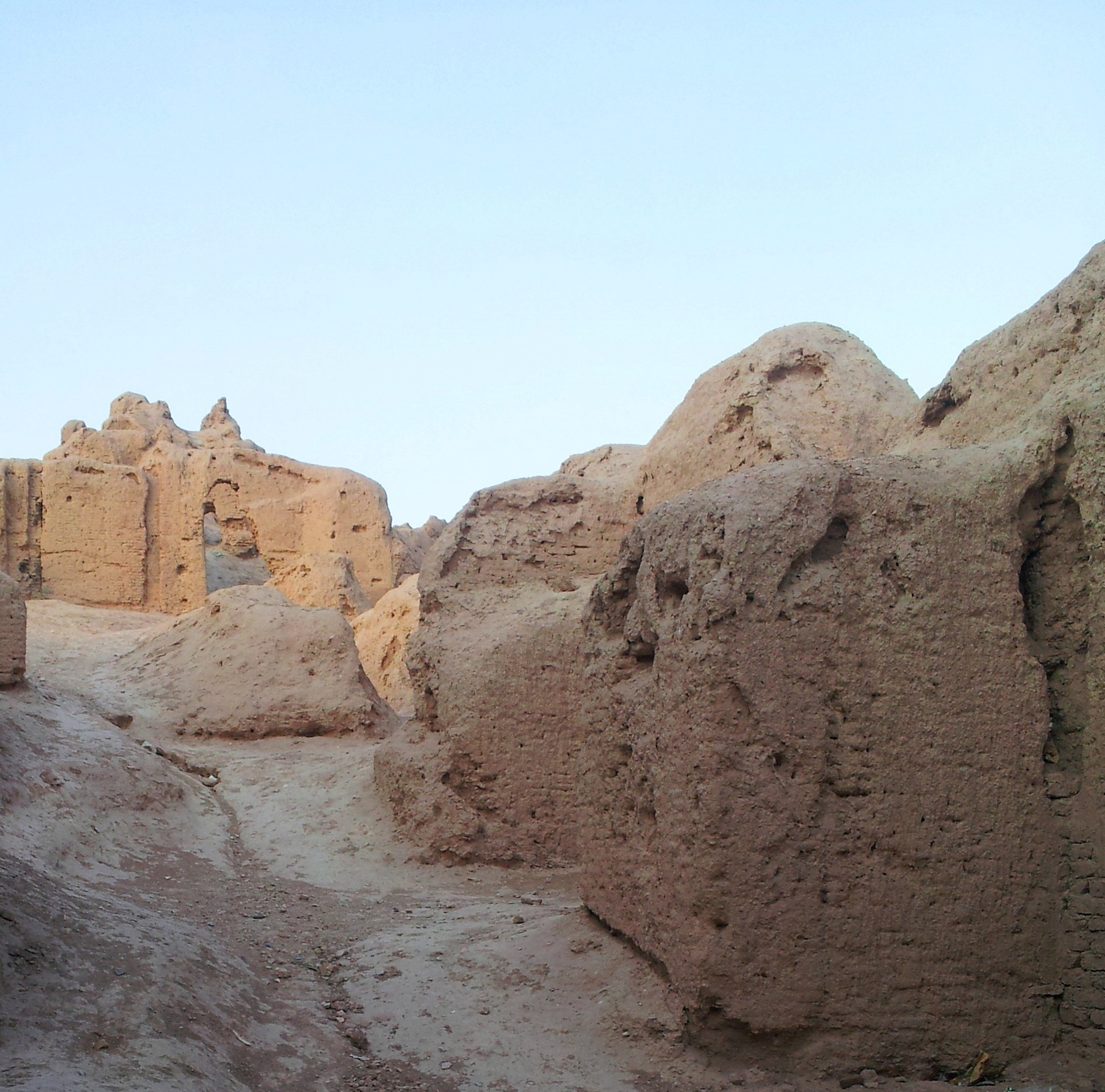 قلعه دختر کرمان